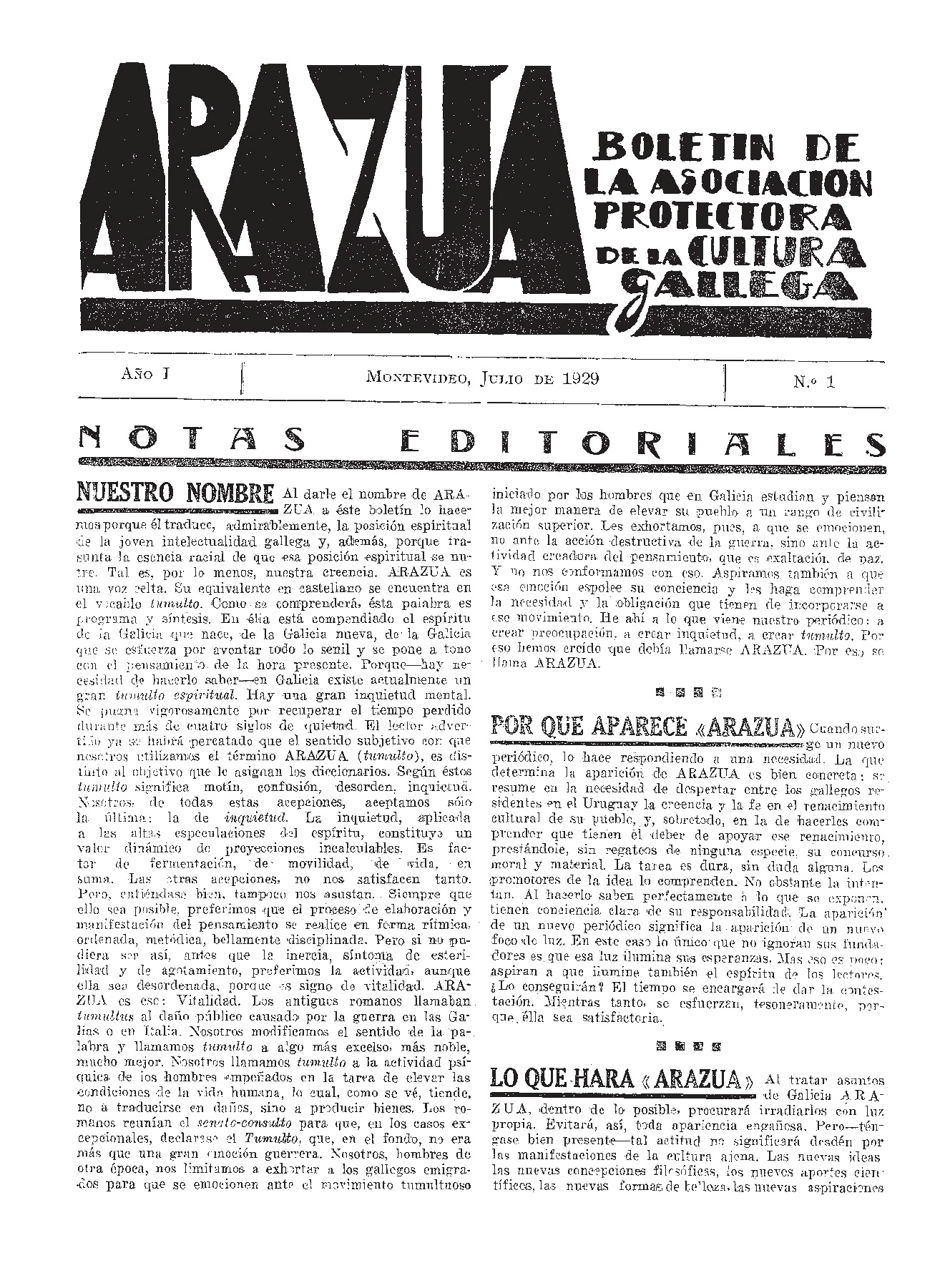 Arazúa. Boletín de la Asociación Protectora de la Cultura Gallega. Montevideo. Julio de 1929. N. 1